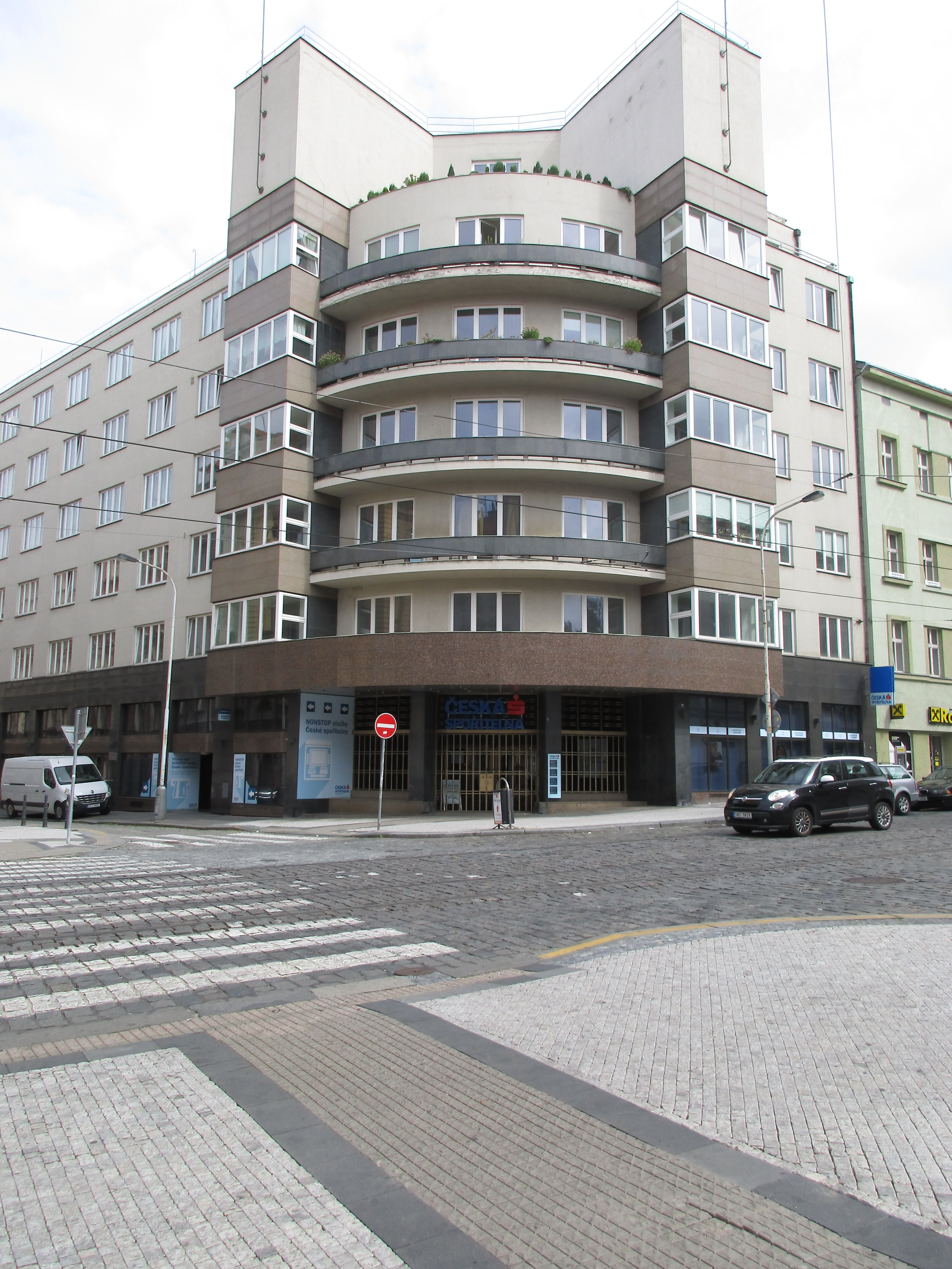 Praha 2-Nové Město, Londýnská 136/54.